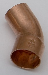 Kupferfitting Typ 5040, Winkel 45° innen-außen